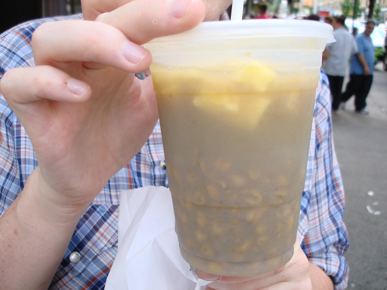 Champus vallecaucano, Cali, Colombia.